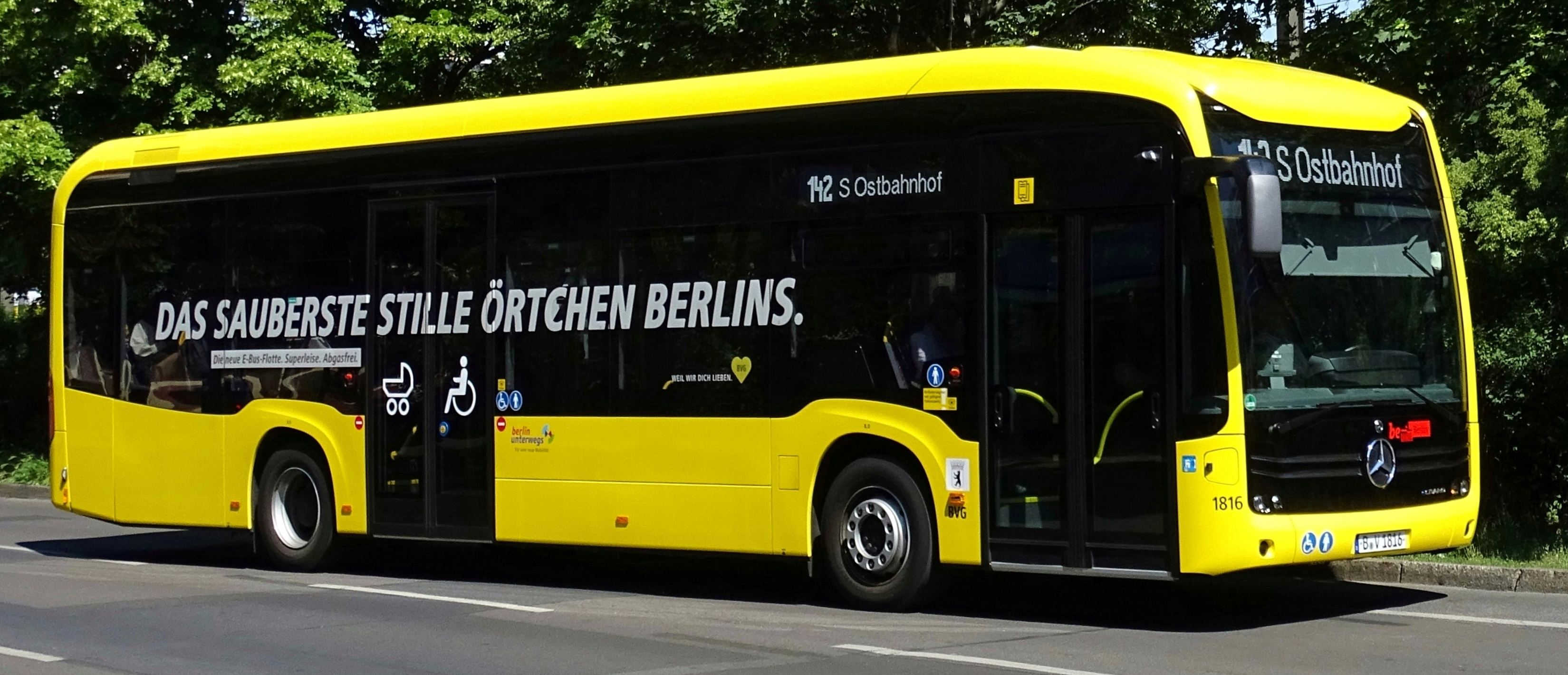 Mercedes Benz eCitaro EN19 der BVG Berlin an der Mollstr. in Berlin-Mitte